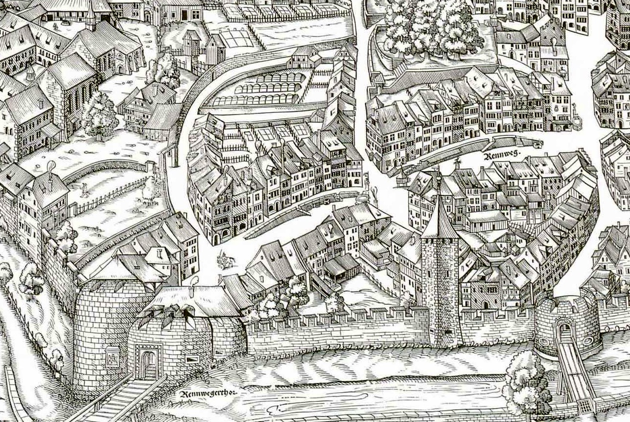 Rennwegtor auf dem Murerplan von 1576